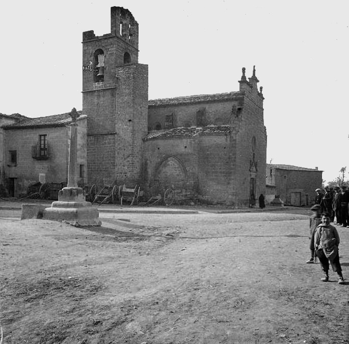 Església de Bellpuig a contrallum. Josep Salvany i Blanch (1917)